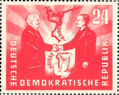 German stamp Oder-Neisse-Linie